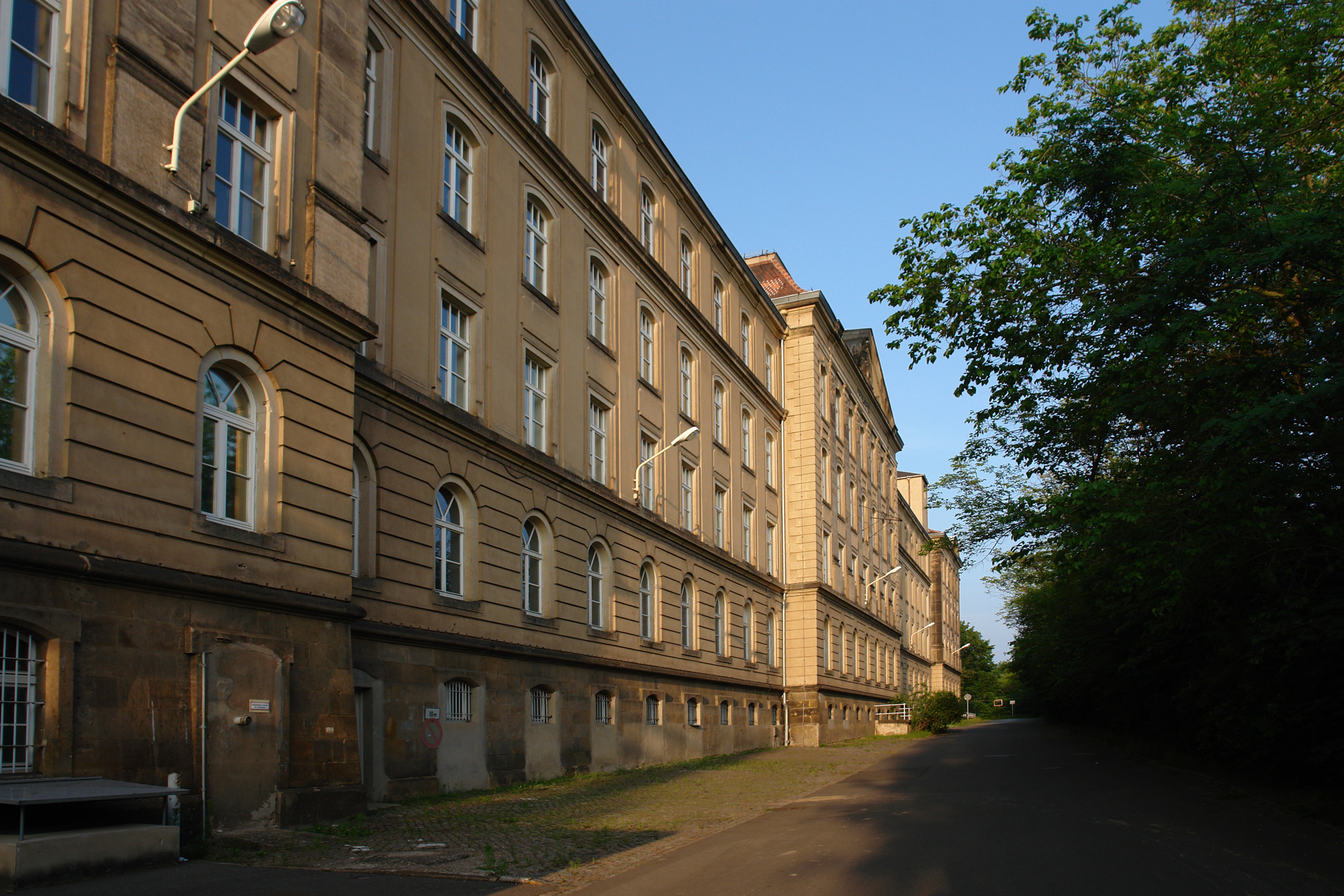 König Friedrich-August-Kaserne Albertstadt Dresden